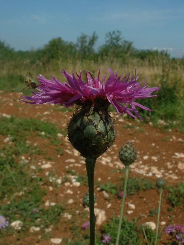 Centaurea scabiosa, Centaurée scabieuse, Bucey-les-Gy, août 2004